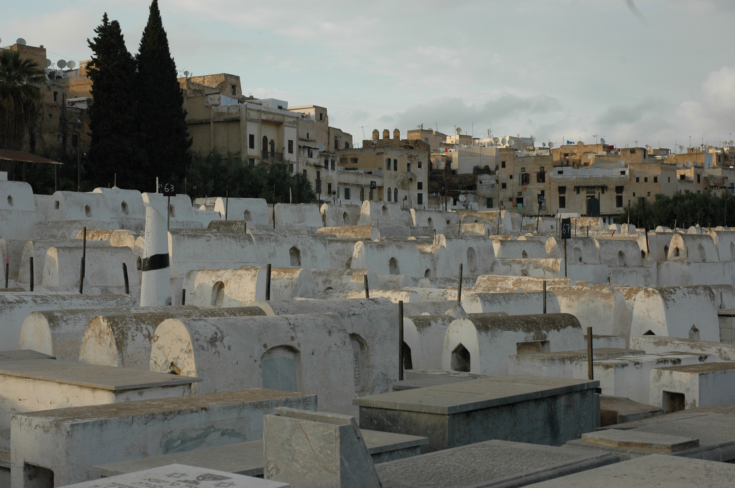 Fes - Mellah - Cementiri.